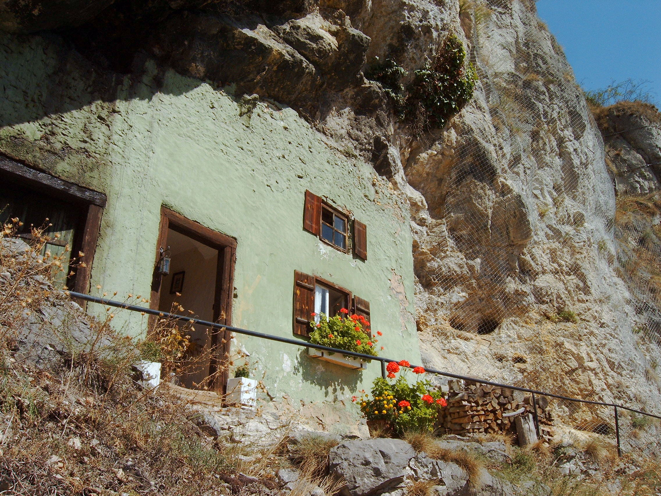 Kallmünz